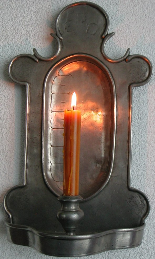 Candle clock, Kerzenuhr